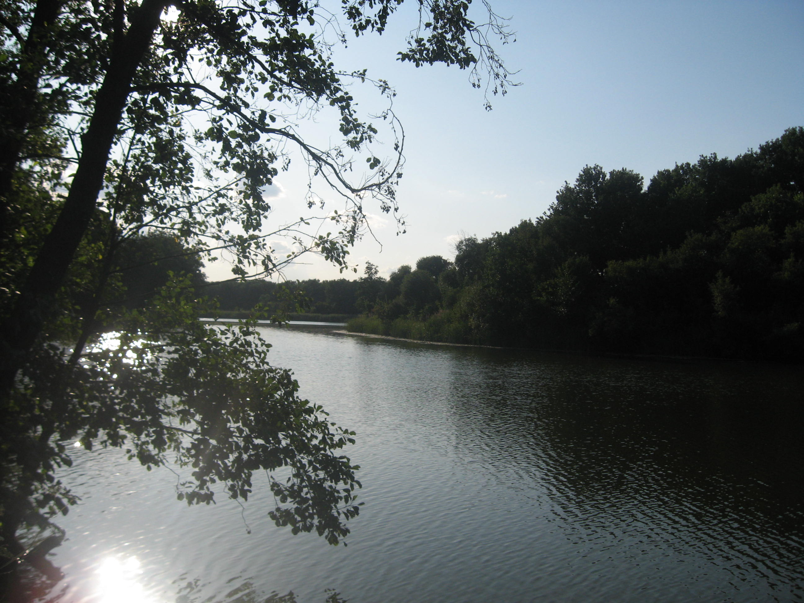 Видна река.